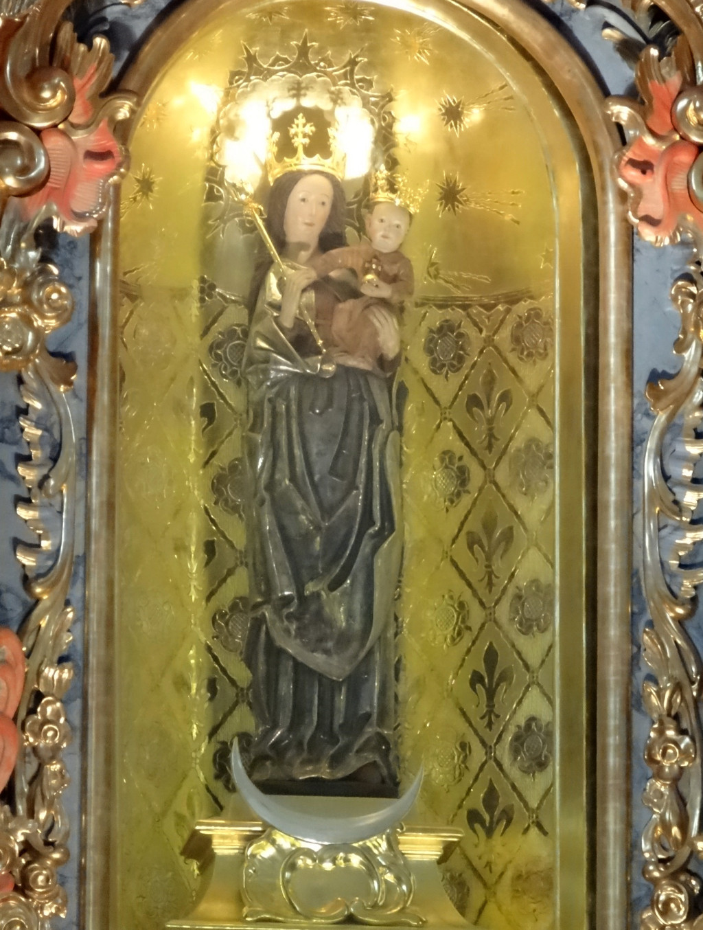 Markowice - zespół klasztorny karmelitów trzewiczkowych: kościół p.w. Nawiedzenia NMP, k. XVII-XVIII; klasztor, 1767, 1923. Figura Madonny Matki Bożej Królowej Miłości i Pokoju